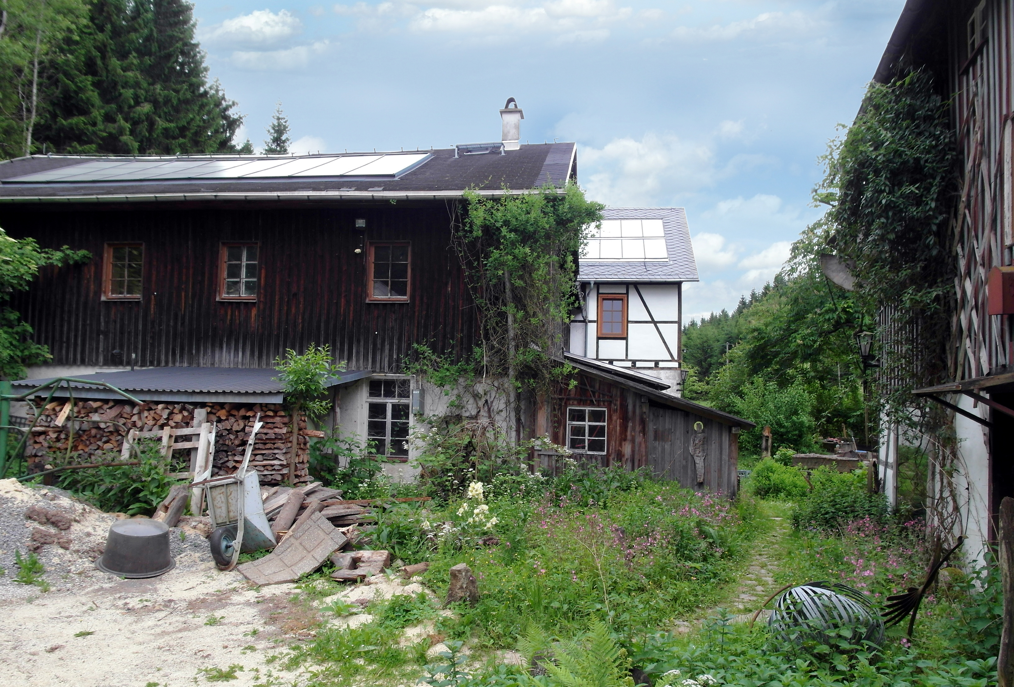 13.06.2017 01762 Reichenau (Hartmannsdorf-Reichenau), Gimmlitztal 42 b,c,e : Die Müllermühle oder Niedere Weicheltmühle im Gimmlitztal (GMP: 50.774219,13.585446) wurde 1869 als Sägemühle erbaut, später auch Kistenfabrik. Bis Anfang der 1950er Jahre in Betrieb. Areal heute privat für Wohnzwecke genutzt. Außerdem: Alternativenergienutzung im Wandel der Zeiten - von Wasserkraft zur Solarenergie. [SAM0236.JPG]20170613310DR.JPG(c)Blobelt